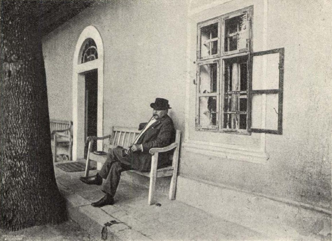 Mikszáth Kálmán horpácsi birtoka a Vasárnapi Ujságban – Mikszáth Kálmán pipázik a padon